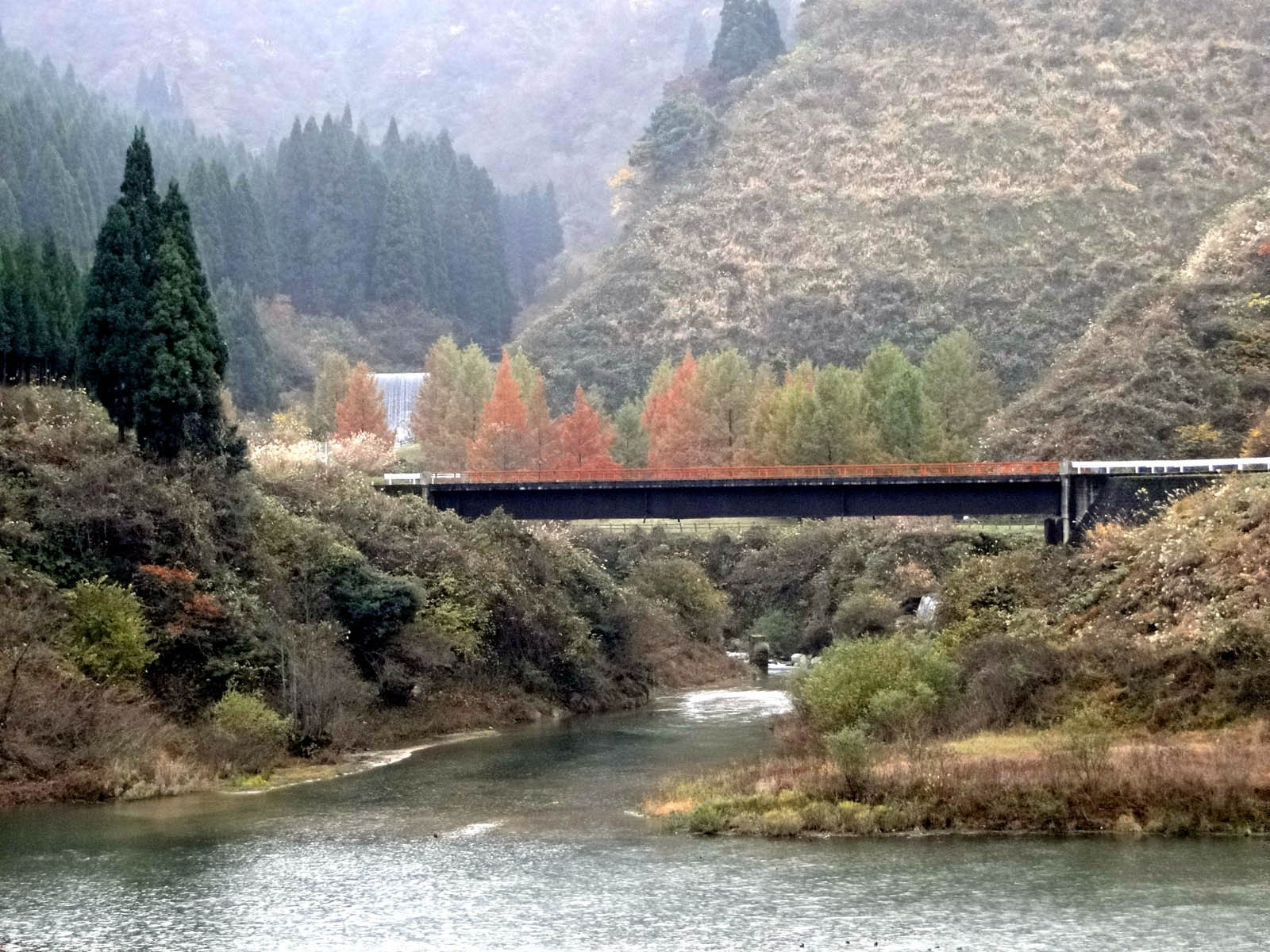 蔵の下橋、堰堤、公園、上流部